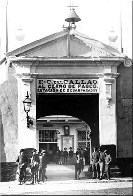 Fachada de la Estación del Ferrocarril Central de Callao a Cerro de Pasco. Posteriormente, aquí mismo se edificó la actual Estación de Desamparados. Foto de 1880. Archivo Courret, Biblioteca Nacional de Lima.